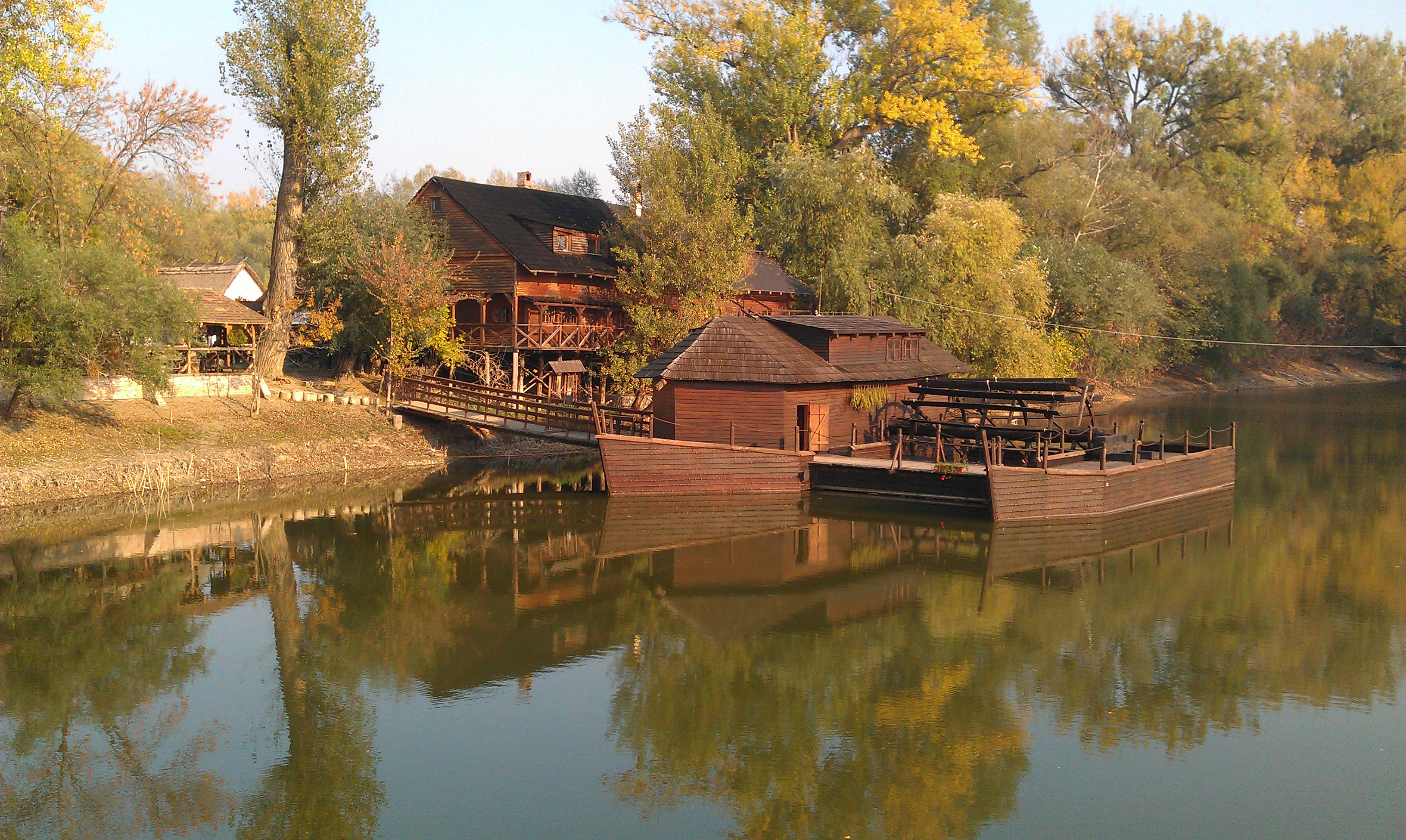 946 03 Kolárovo, Slovakia